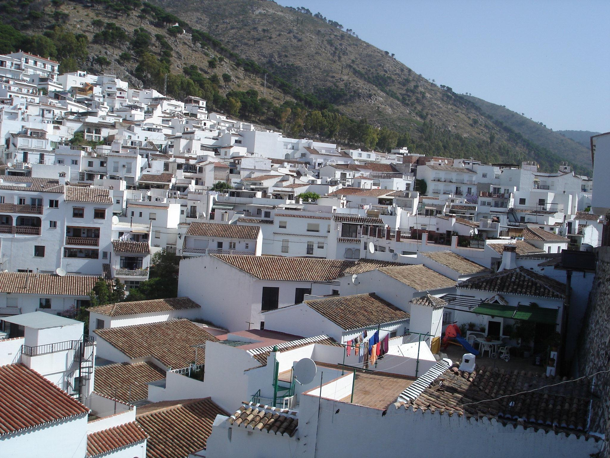 Ville de Mijas côté Est (Province de Malaga) en Espagne Auteur : Jean-Claude Perez